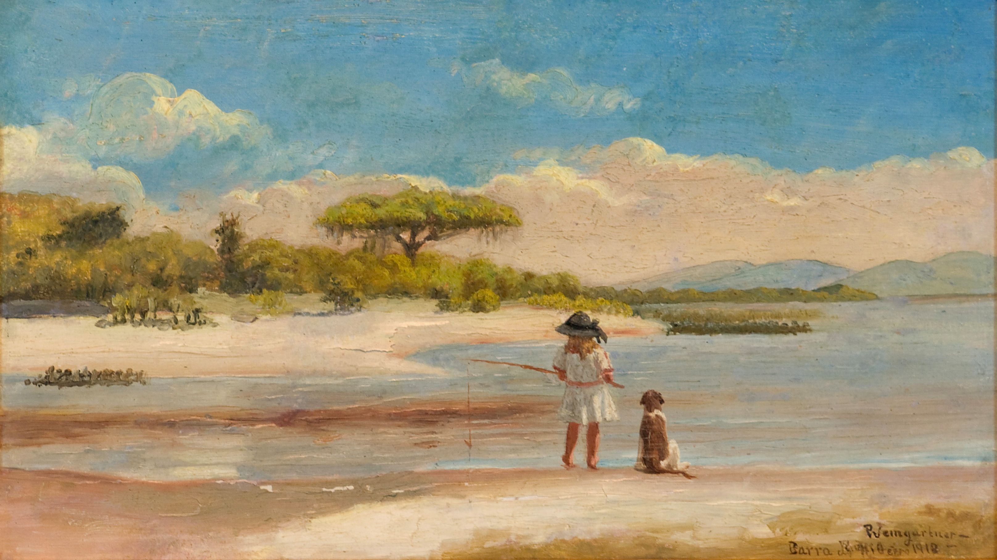 “Barra do Ribeiro”. óleo sobre madeira, 13,5 x 23,0 cm